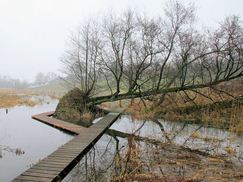 Syltemaen ved Svendborg